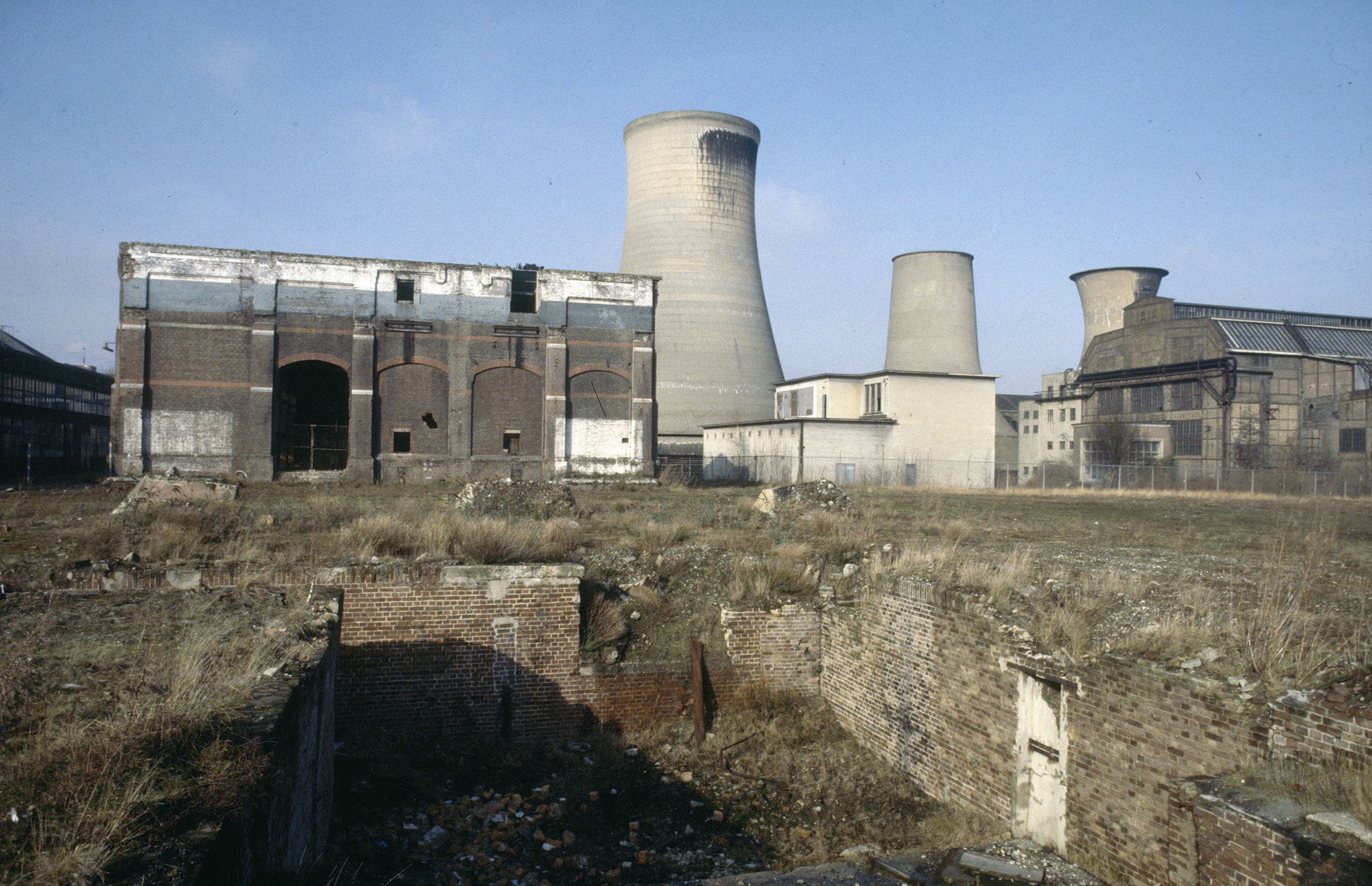 Staatsmijn Emma: Exterieur OVERZICHT RESTANT MIJNGEBOUW